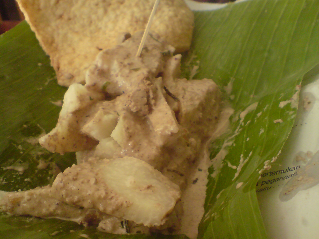 Cabuk rambak